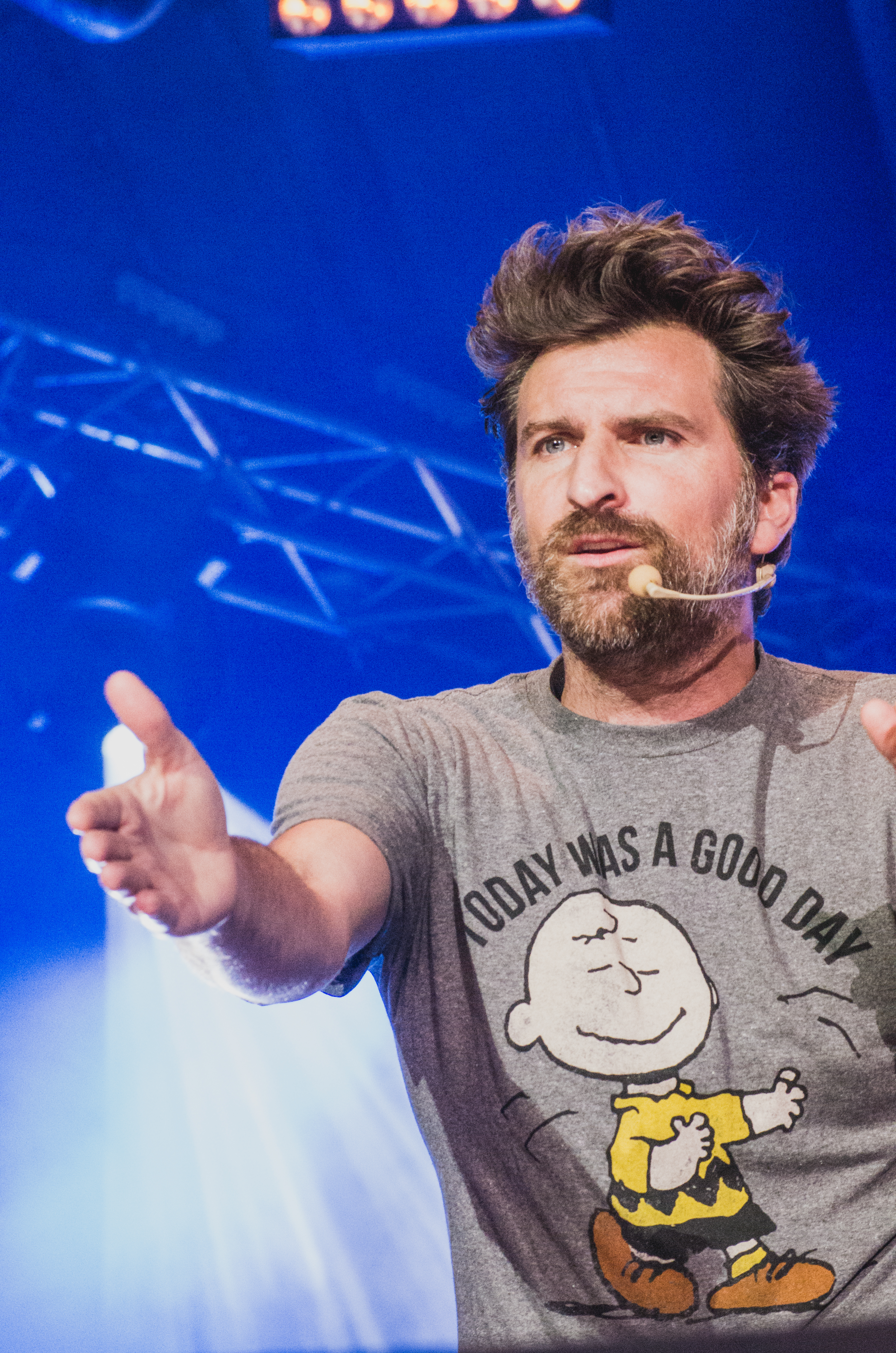 Jean-Thomas Jobin lors de « La presque 500e de la soirée est (encore) jeune »